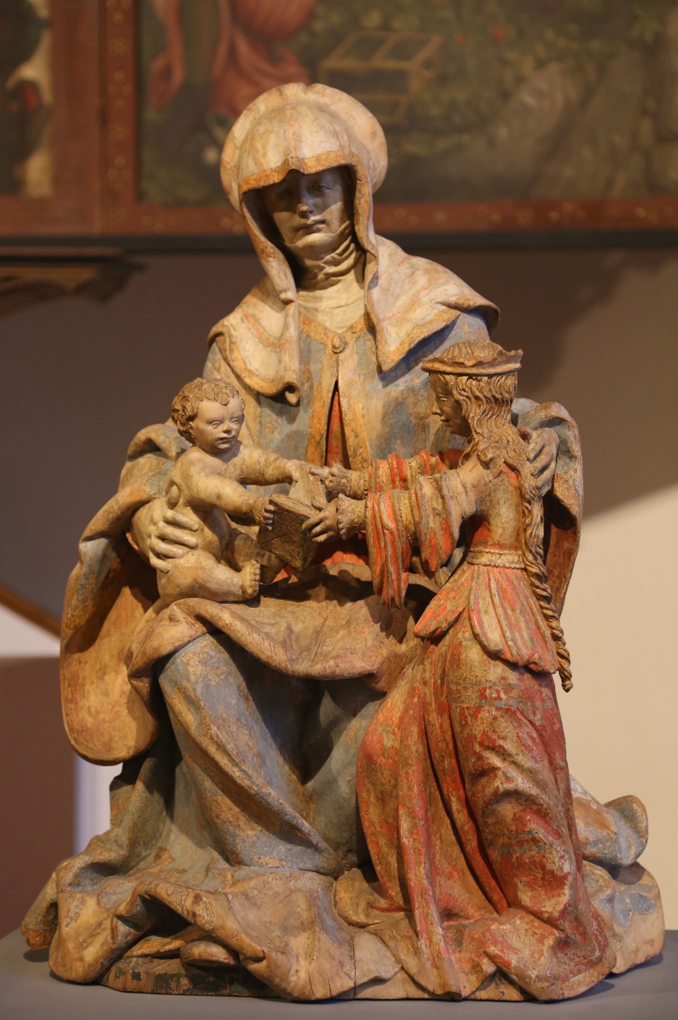 Hans Leinberger: Hl. Anna Selbdritt, um 1510, Lindenholz mit Resten älterer Fassung, Bayerisches Nationalmuseum in München